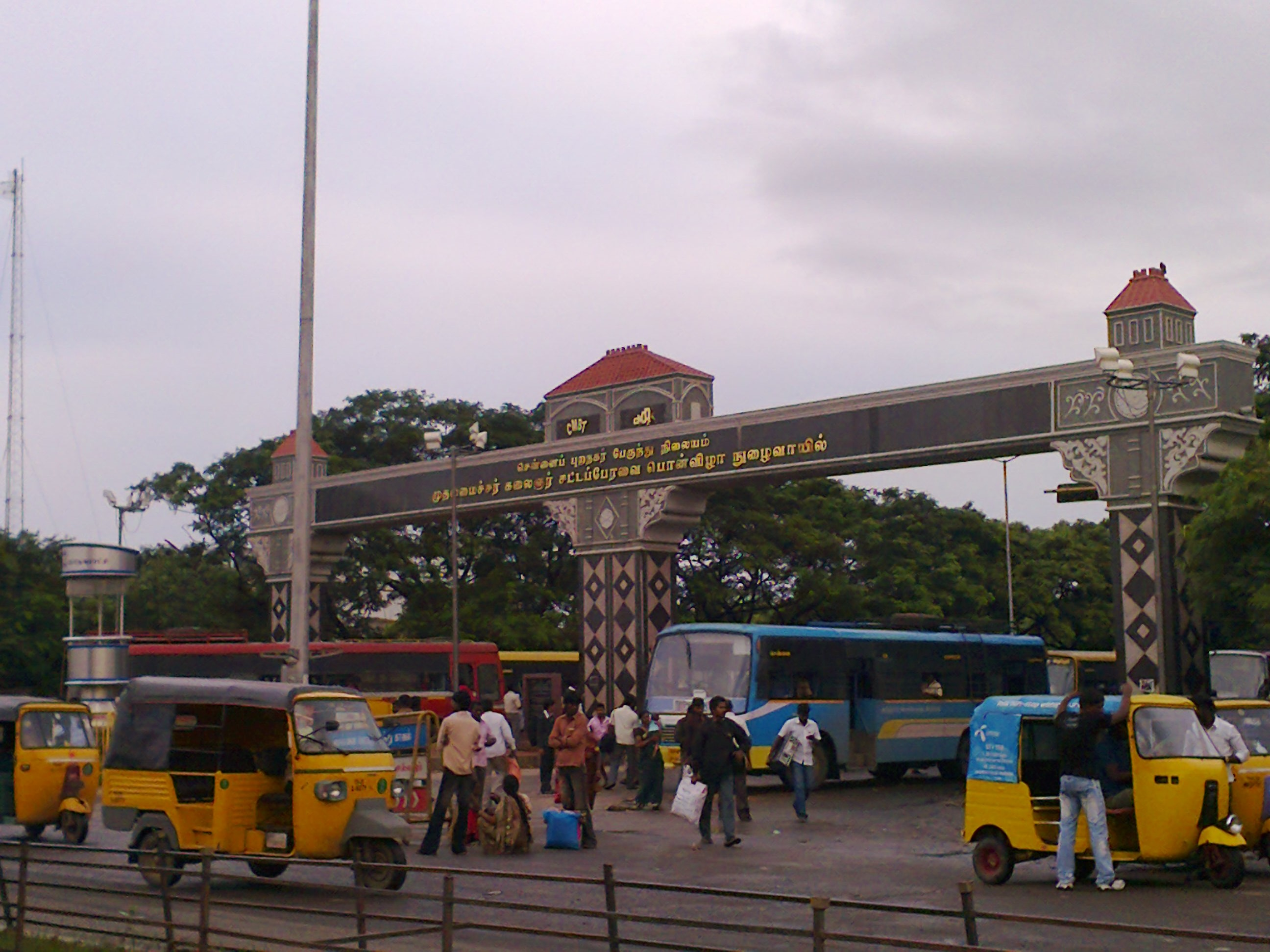 coiyambedu bus stand